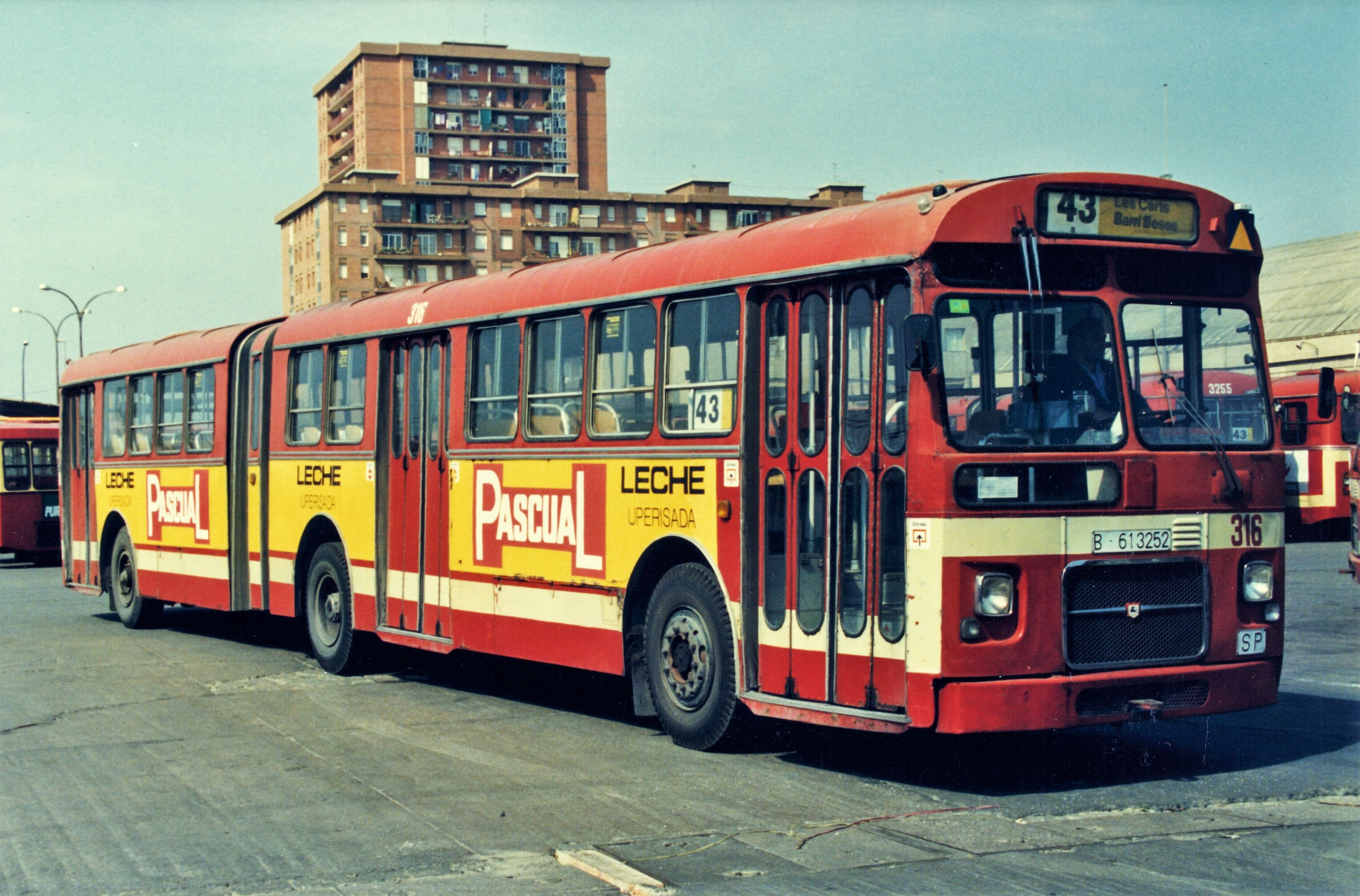 El autobús articulado Pegaso 6035-A número 316 de Transportes de Barcelona, en las cocheras de Levante. Fue adquirido por Urbanizaciones y Transportes en 1968, y traspasado a TB en 1976.